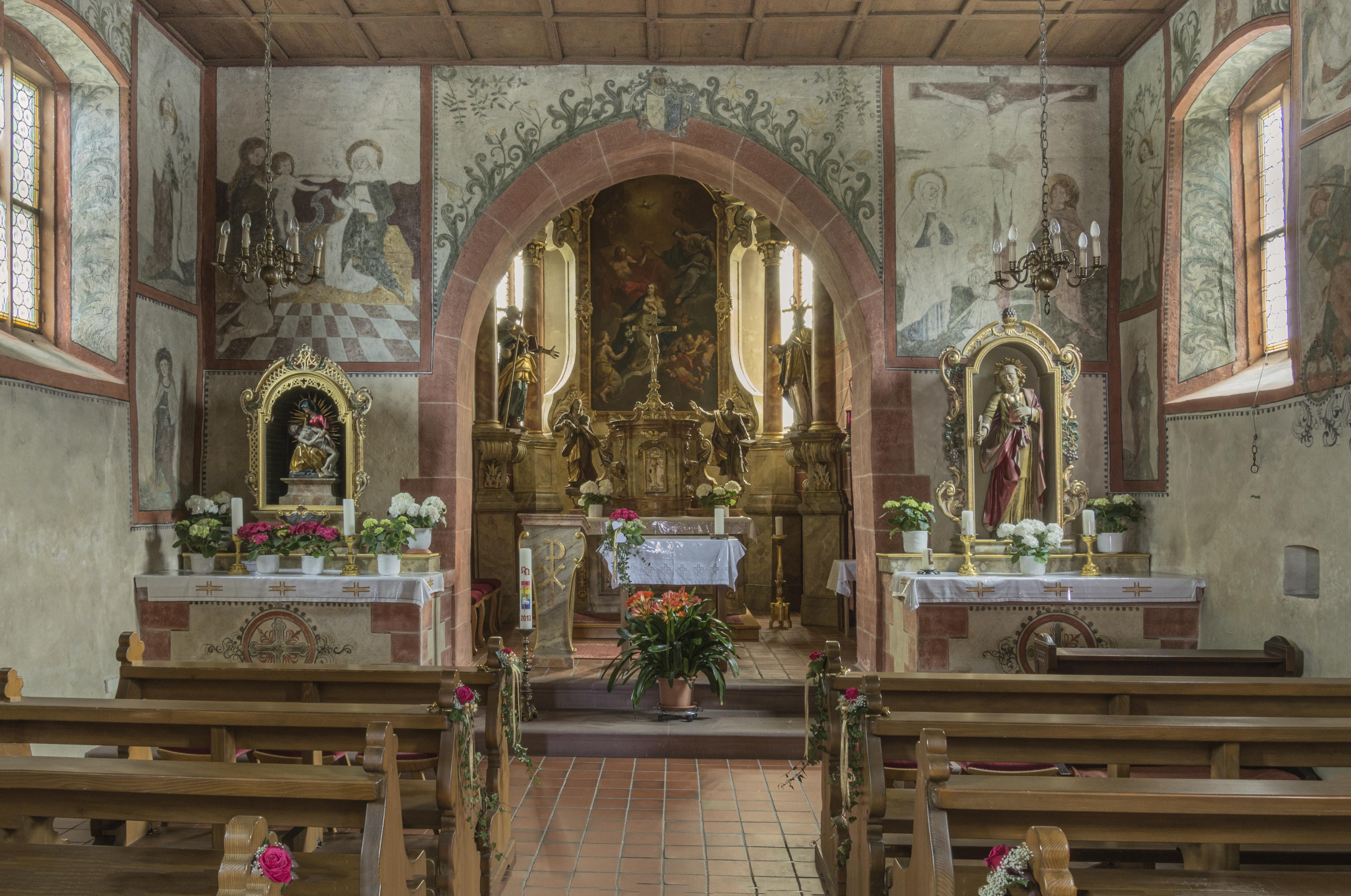 Bilder von der Bühlwegkapelle in Ortenberg